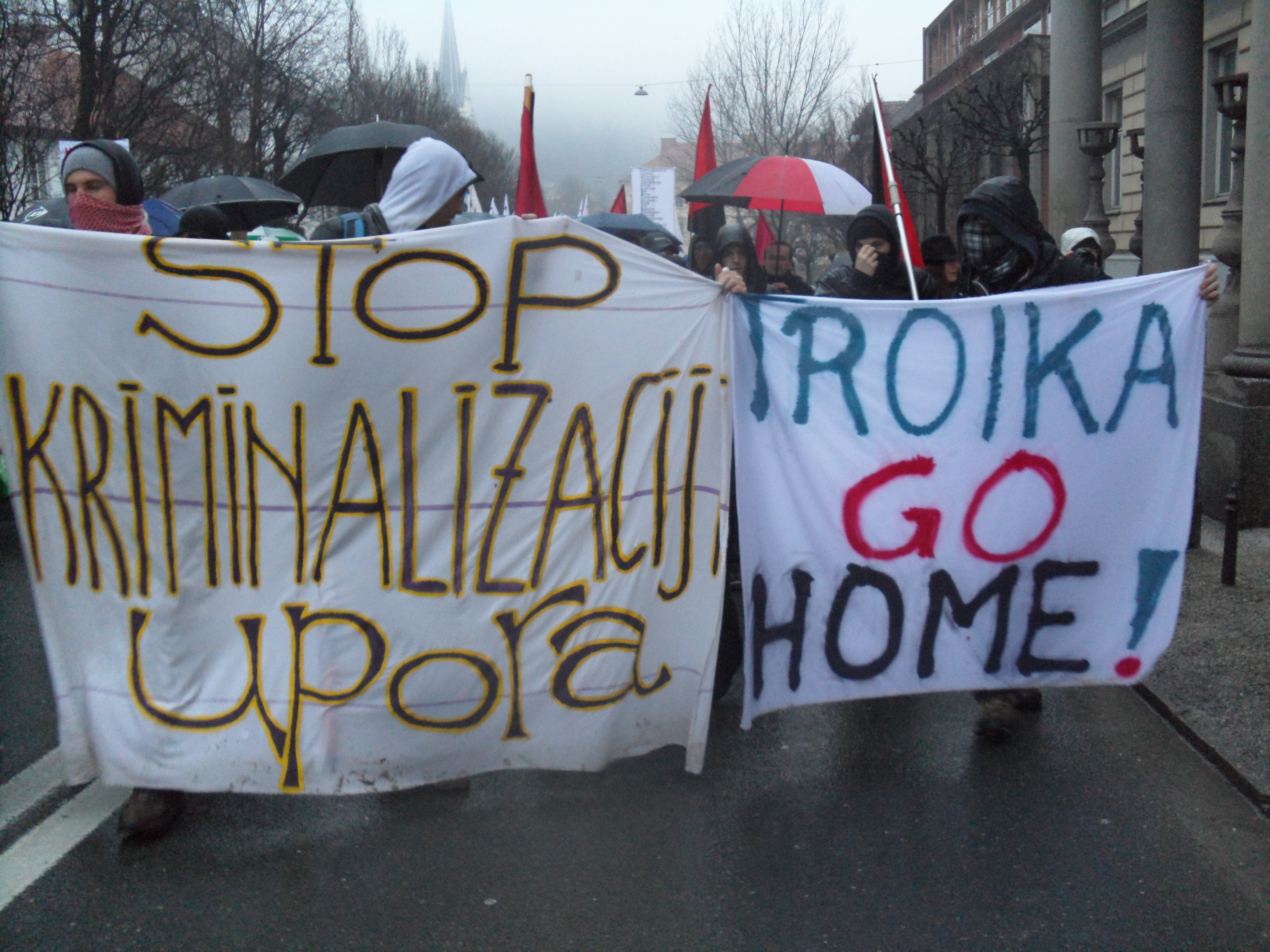 Antikapitalistični blok: "Strop kriminalizaciji upora. Troika go home."Na četrti vseslovenski vstaji se je zbralo okoli 5000 ljudi. Kot je poudaril odbor Vseslovenske ljudske vstaje, je osnovna zahteva protestnikov, odstop političnih elit, ostala neizpolnjena. Protestniki so zato v obliki t.i. Pomladne deklaracije vseslovenske ljudske vstaje zahtevali razpis predčasnih volitev v roku šestih mesecev od imenovanja prehodne vlade, na čelu prehodne vlade pa osebo z nesporno moralno integriteto. Prav tako so zahtevali instrument ljudske nezaupnice in radikalno reformo sodstva, pa tudi takojšnje in učinkovito sojenje vsem, ki so do premoženja prišli na sporen način, in tudi, da bankirji prevzamejo odgovornost. Zahtevali so tudi prenovo Slovenije, ki bo temeljila na morali in socialni pravičnosti, večji vpliv ljudi na to, kdo bo sedel v DZ skozi preferenčni glas ter ustanovitev ustavne komisije, ki bo vključevala državljane in uveljavila potrebne spremembe v ustavi.